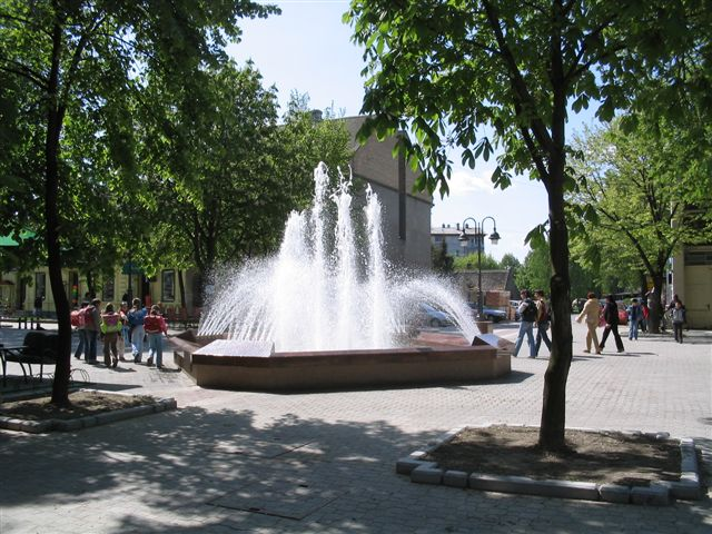 Фонтана у Улици српских владара